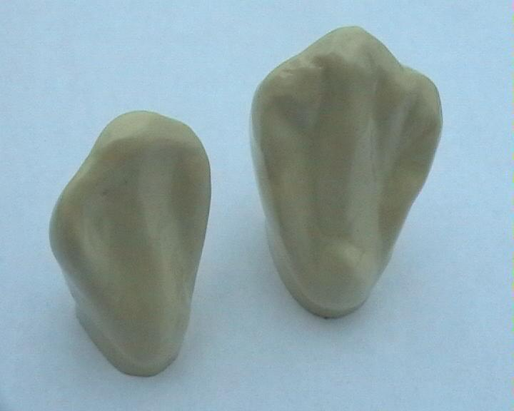 Unterer (links im Bild) und oberer Eckzahn (rechts im Bild) von palatinal - Größenunterschied (Durchschnittswerte); oberer Eckzahn meist mit deutlicherem palatinalem Höcker